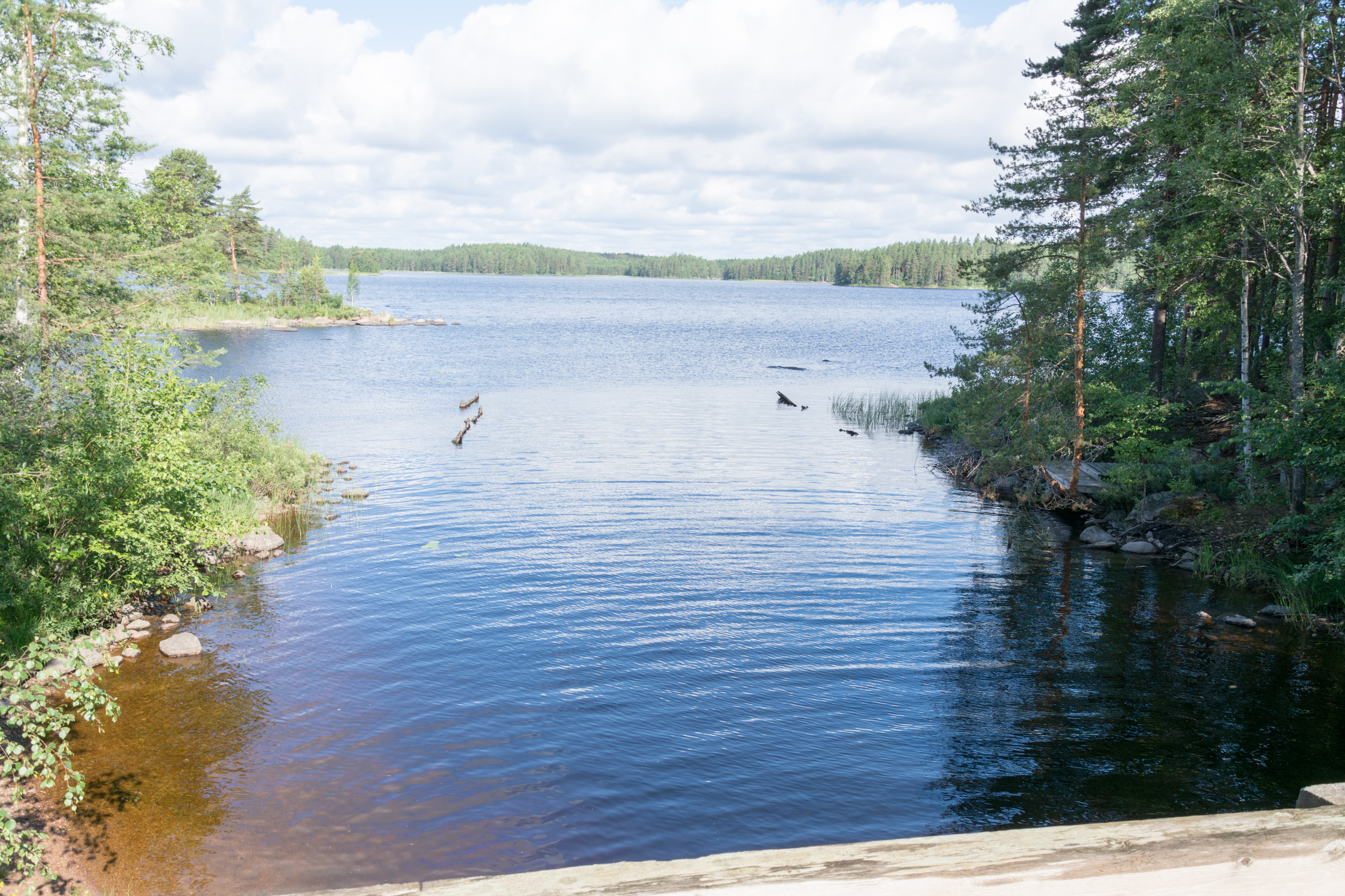 Kivisilmän kanava Kouvolassa